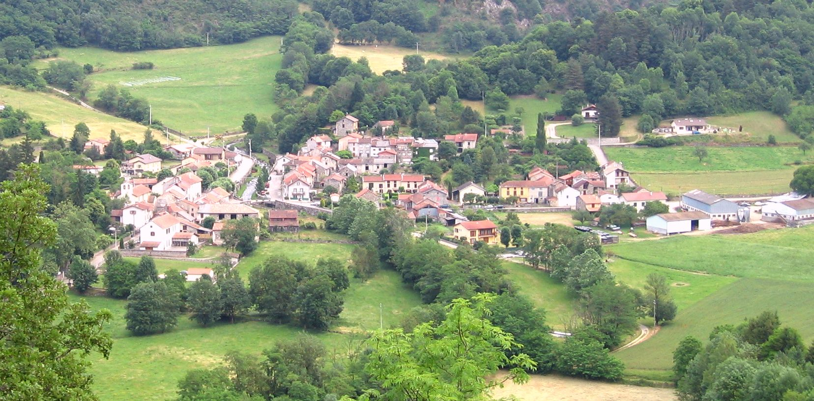 Vue générale sur le village d'Arnave